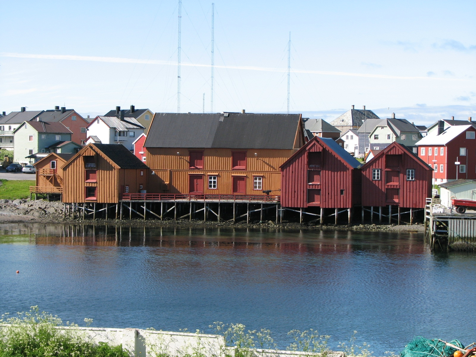 Pomormuseet